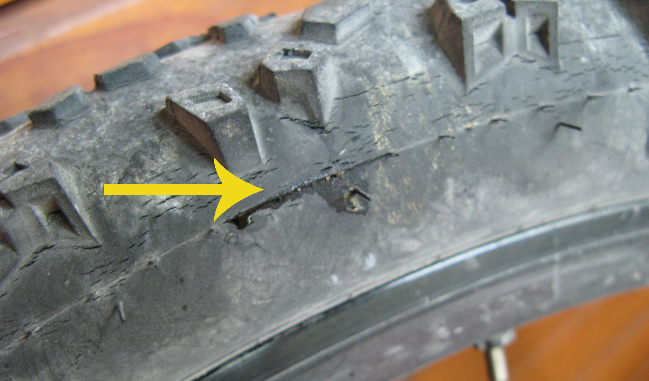 Фликано место са тублес текучином.